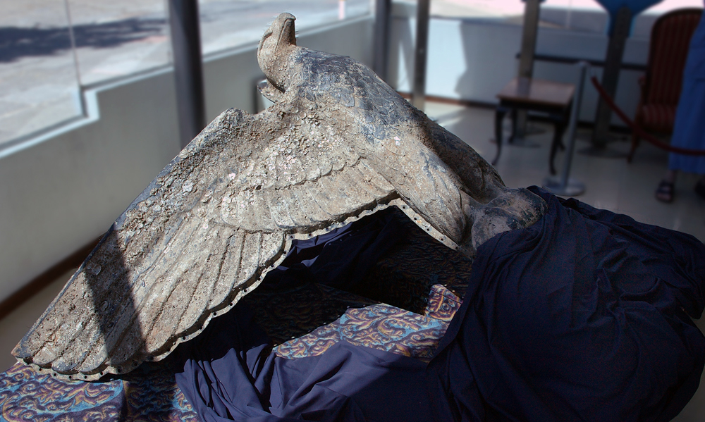 Aguila utilizada como mascarón de proa en el buque alemán Admiral Graf Spee. Recuperada del mar en febrero de 2006 y expuesta en Montevideo Uruguay en el Lobby del Hotel Palladium. Author: Fernando da Rosa